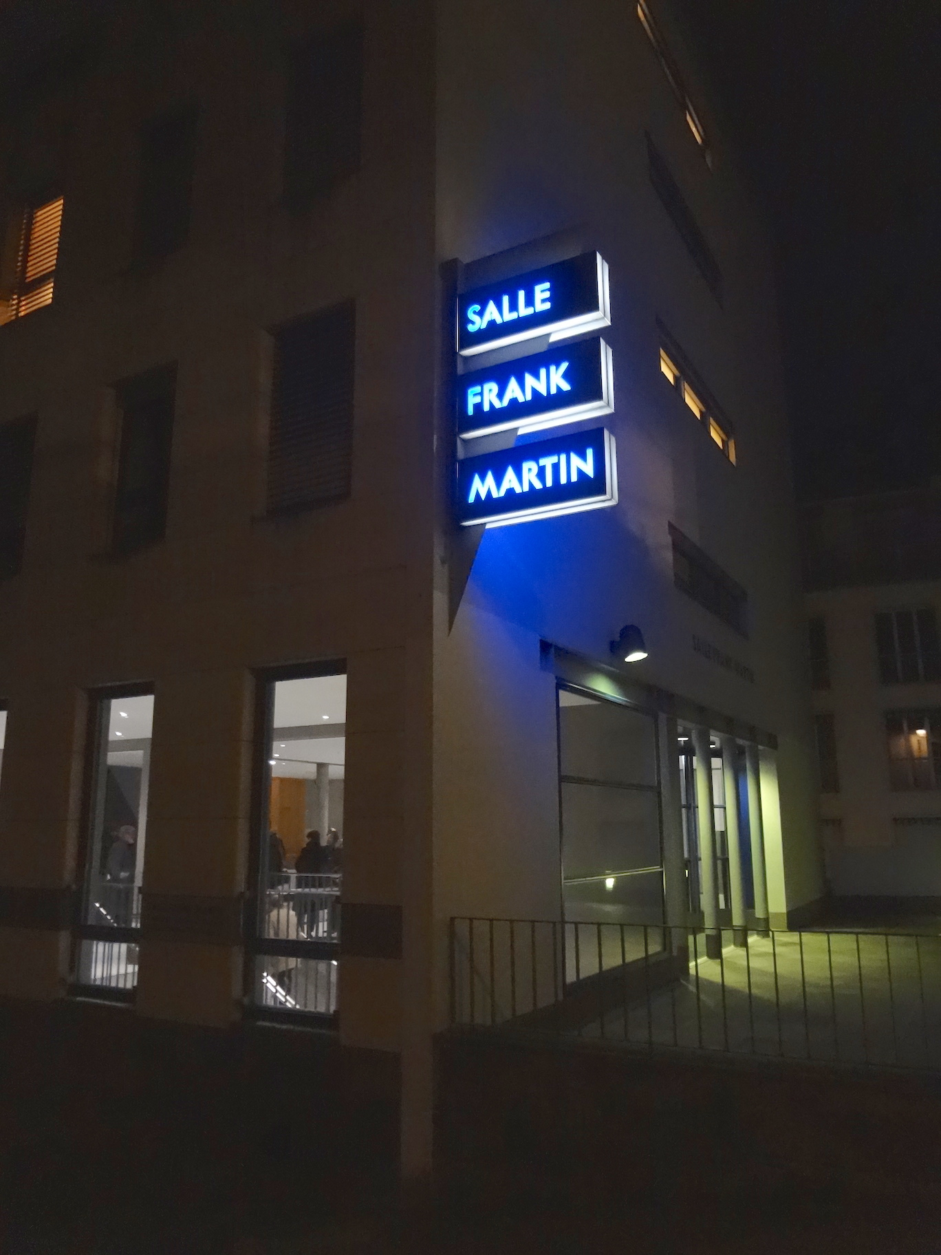 Salle Frank Martin, aula du Collège Calvin, Genève. Extérieur.